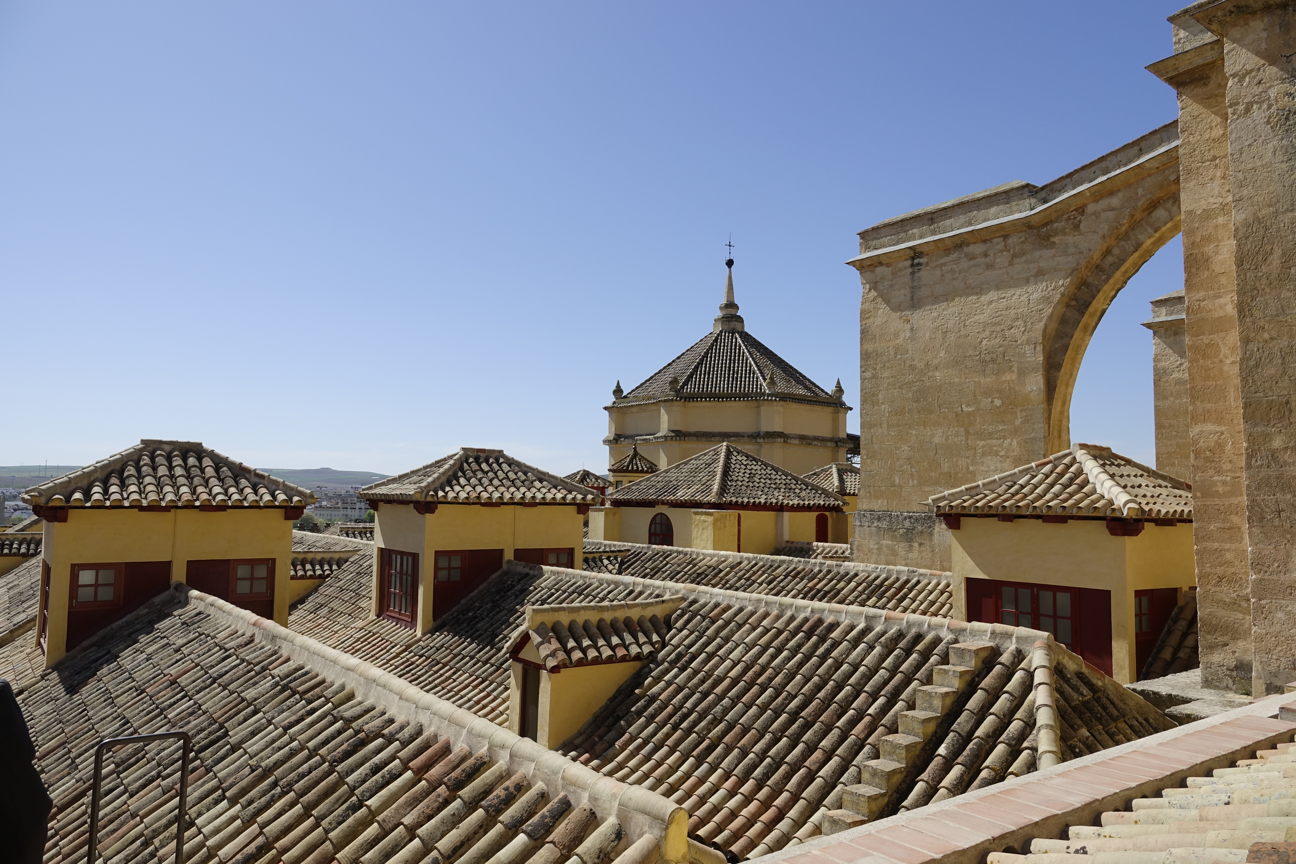 Vista de la cubierta de la Mezquita-Catedral. Se aprecian los lucernarios instalados en la ampliación de Almanzor y uno de los contrafuertes que sostienen la iglesia cristiana de la ampliación del siglo XVI.